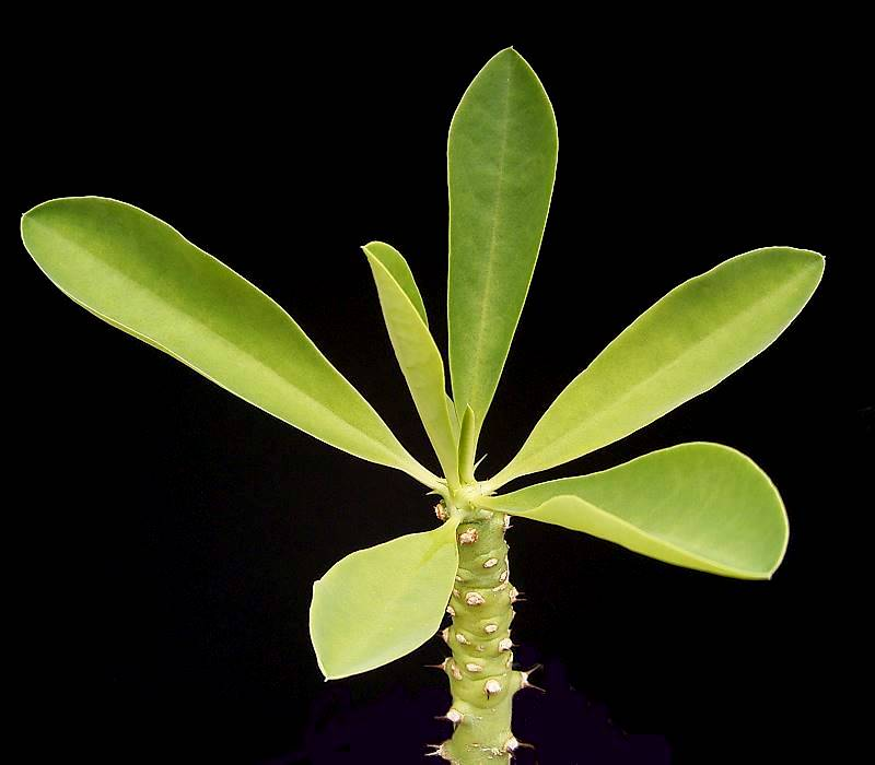 Euphorbia teke